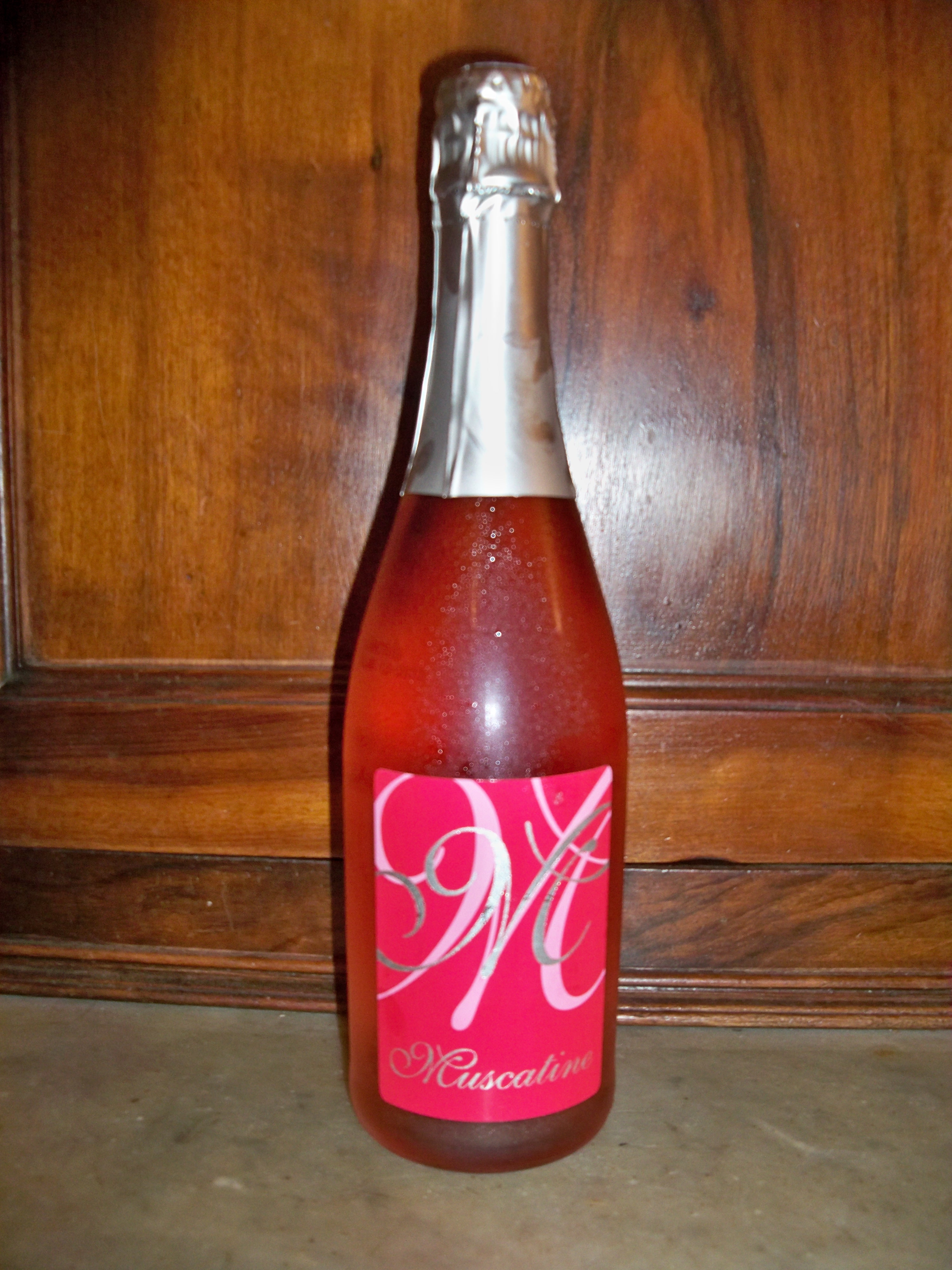 Bouteille de Muscatine